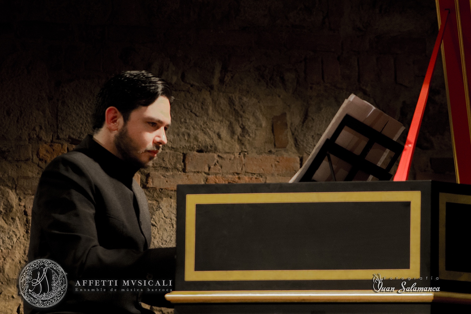 Andrés Martínez Pardo Clavecín